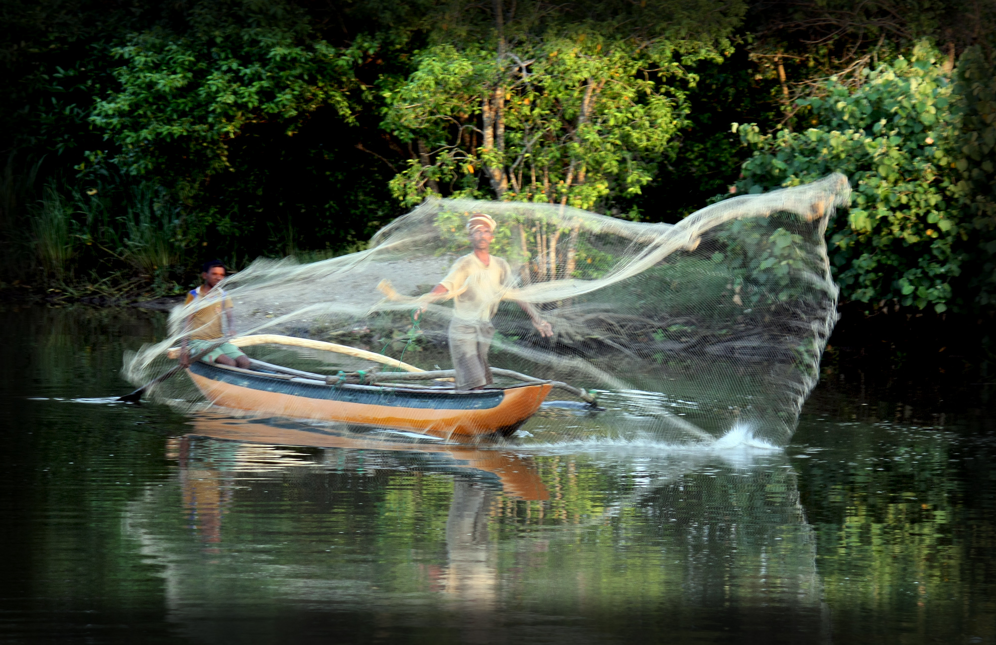 வாழைச்சேனை வாவியில் மீன்பிடித்தல்